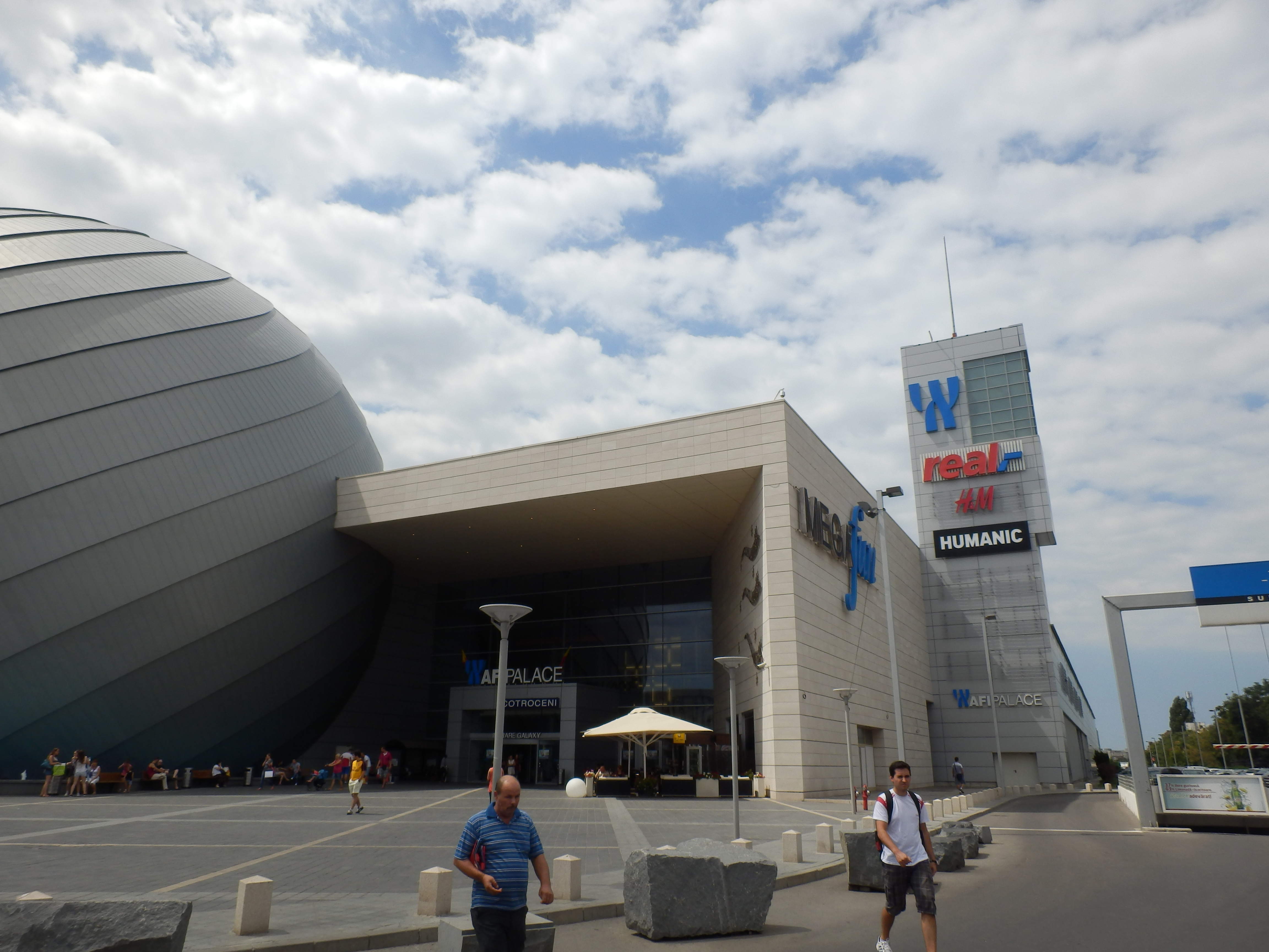 București, România